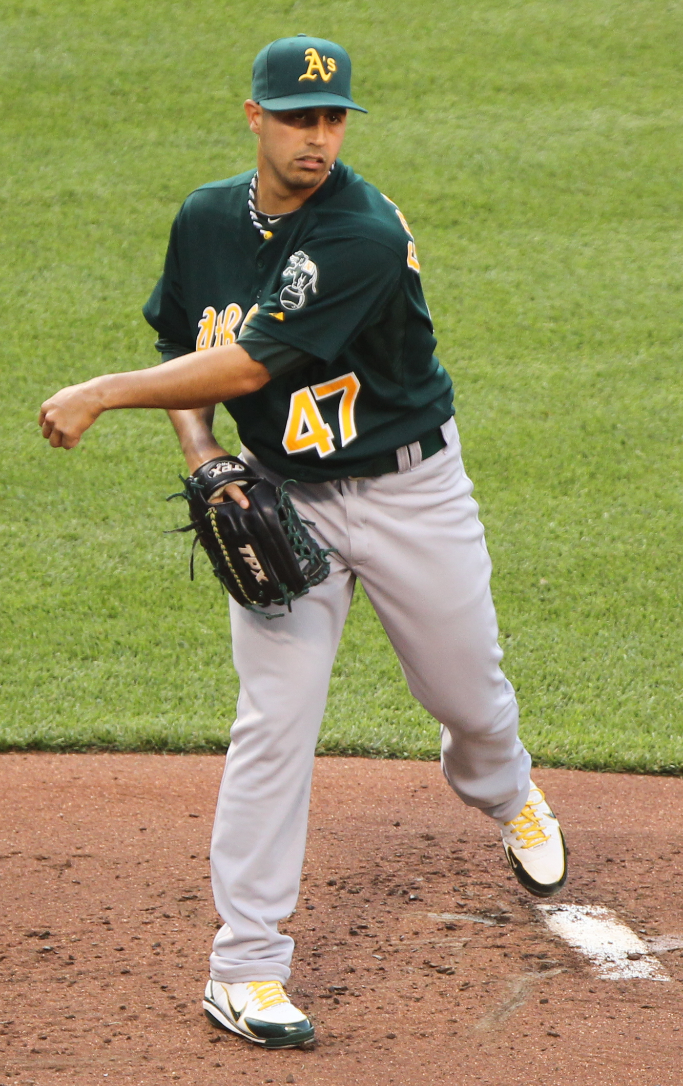 Gio Gonzalez